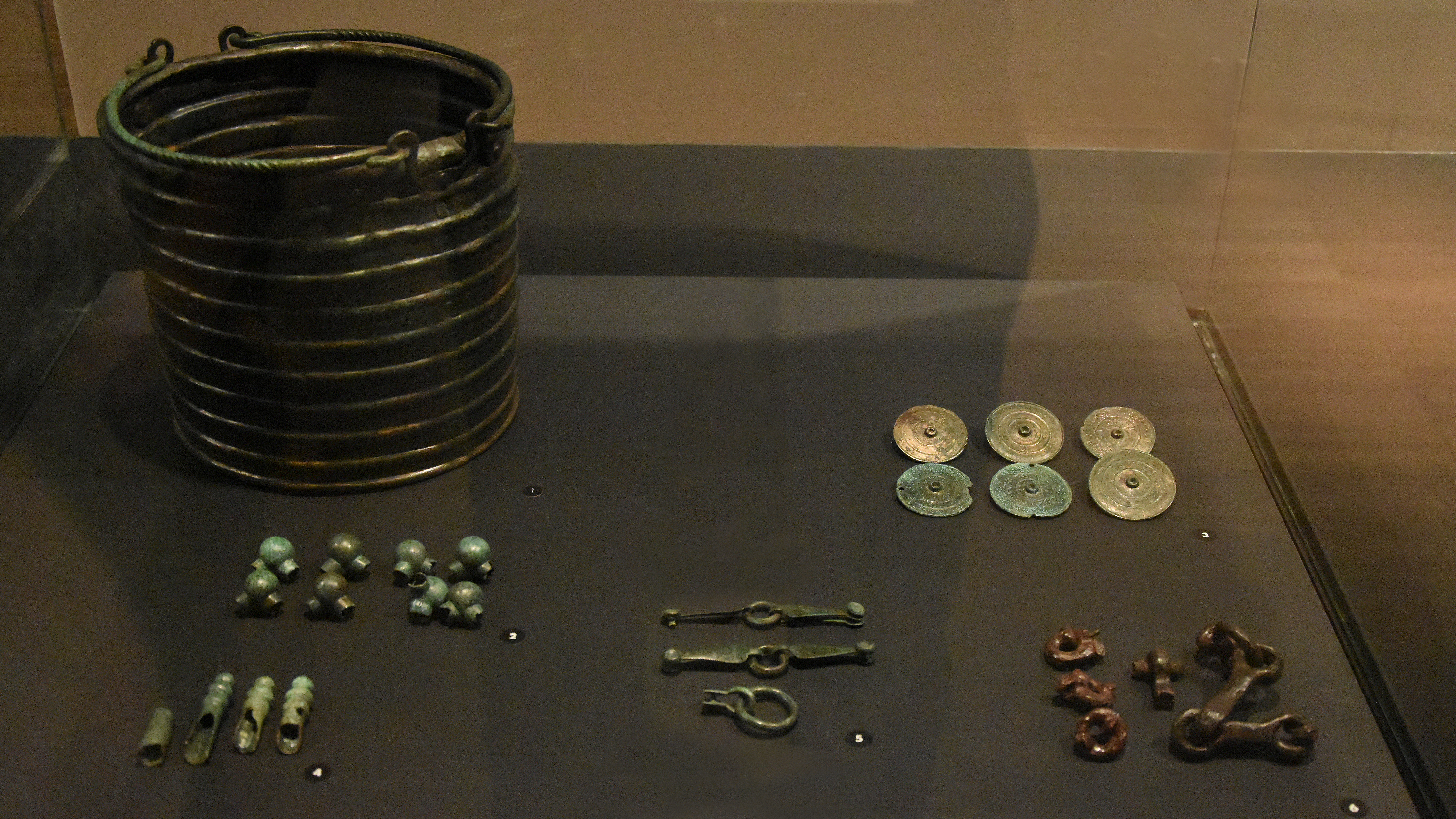 Grafvondsten Wijshagen Gallo-Romeins Museum (Tongeren) 24-03-2018